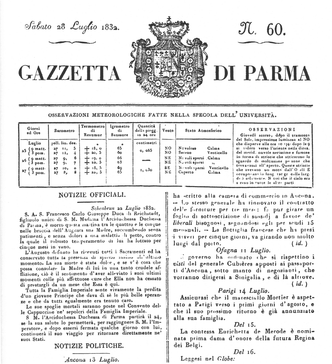 Gazzetta di Parma del 28 luglio 1832(newspaper "Gazzetta di Parma", july 28, 1832)- annuncio della morte di Napoléon François Joseph Charles Bonaparte (Napoleone II di Francia), re di Roma (roi de Rome), figlio di Napoleone Bonaparte (Bonaparte's son)